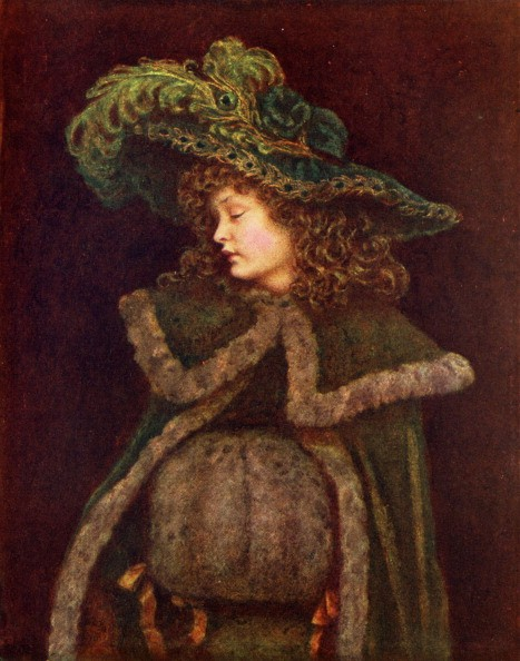 "The Peacock girl" - Mädchen mit einer Pfauenfeder am Hut und großem Pelzmuff, gemalt von Kate Greenaway. From a water-colour drawing in possession von John Greenaway Esq.